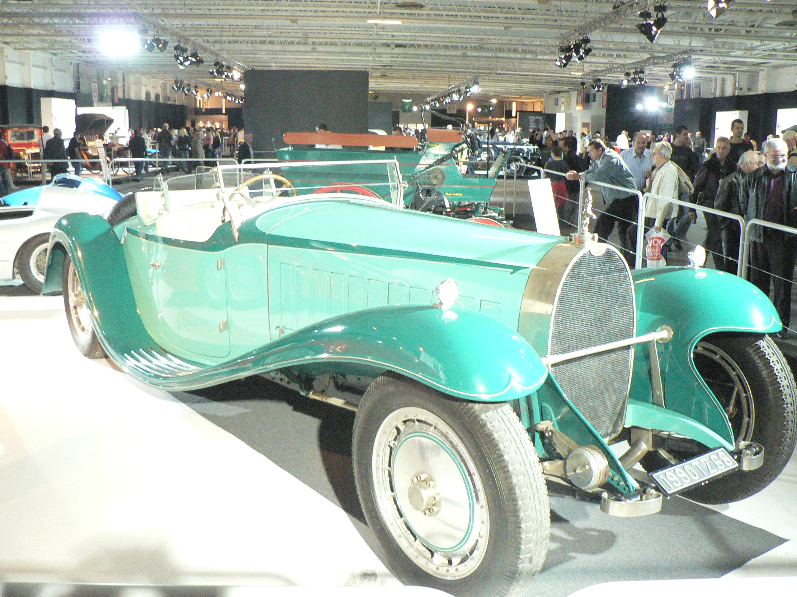 Mondial de l automobile de Paris (October 2006)